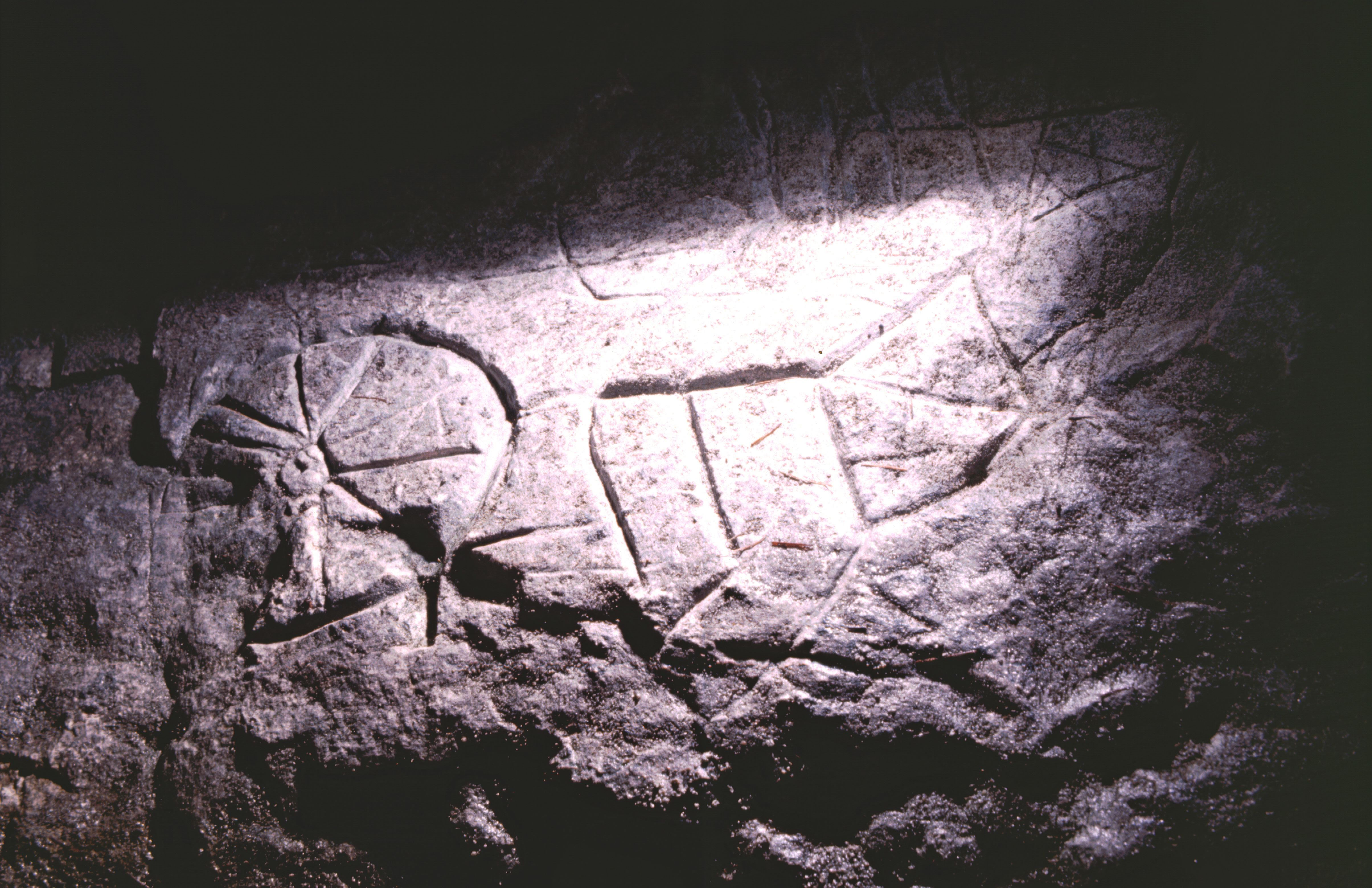 Felsritzbilder in der Notgasse